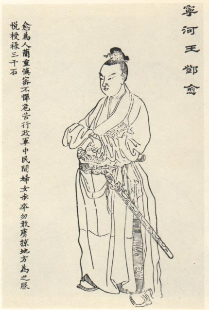 鄧愈，明朝军事將領。